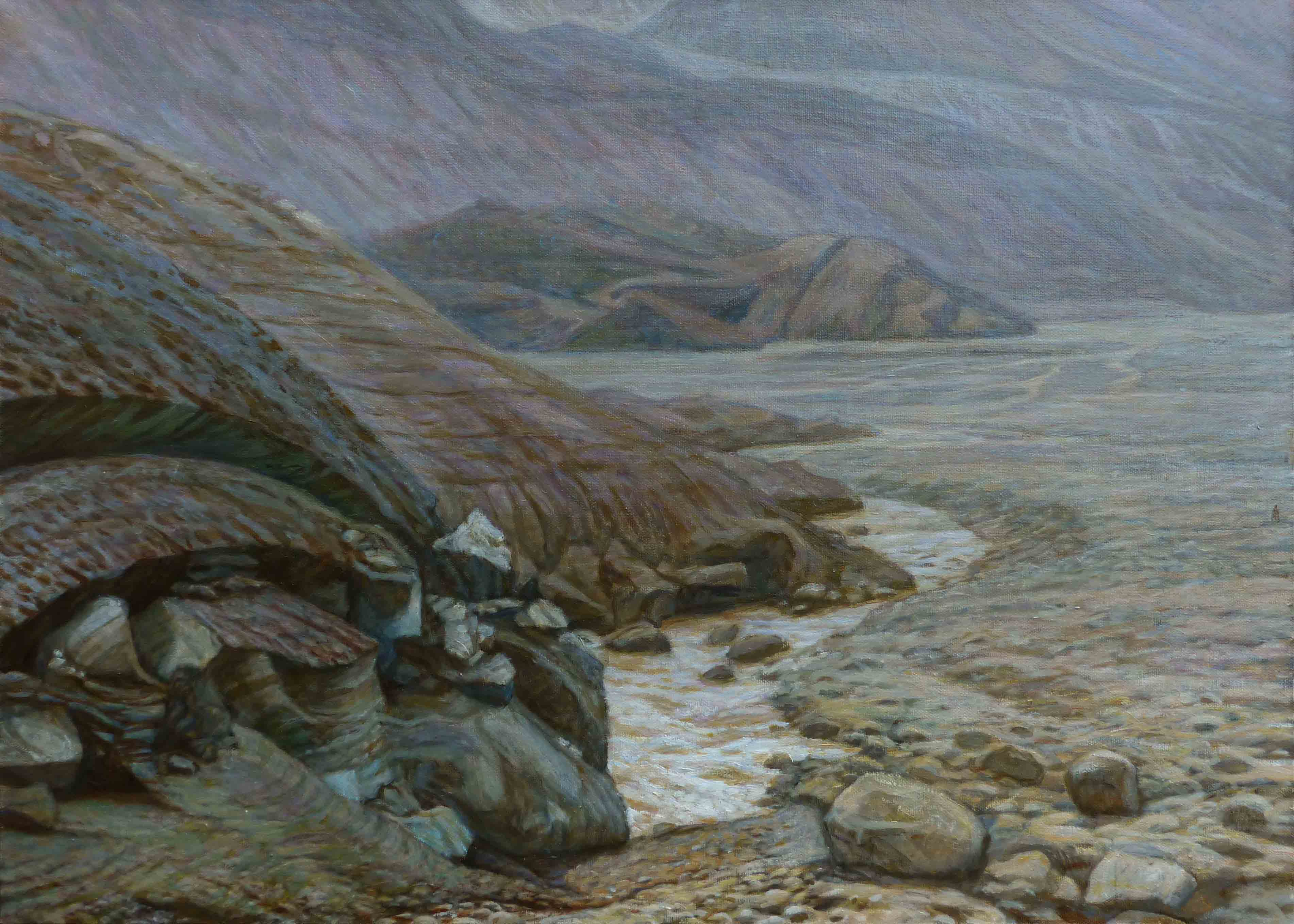 Картина Исток реки Сарыджаз у ледника Семёнова сделана с этюда из экспедиции Рязанского музея путешественников 2015 года к леднику, в которой художник принимал участие. (Пресняков, Максимильян Анатольевич)